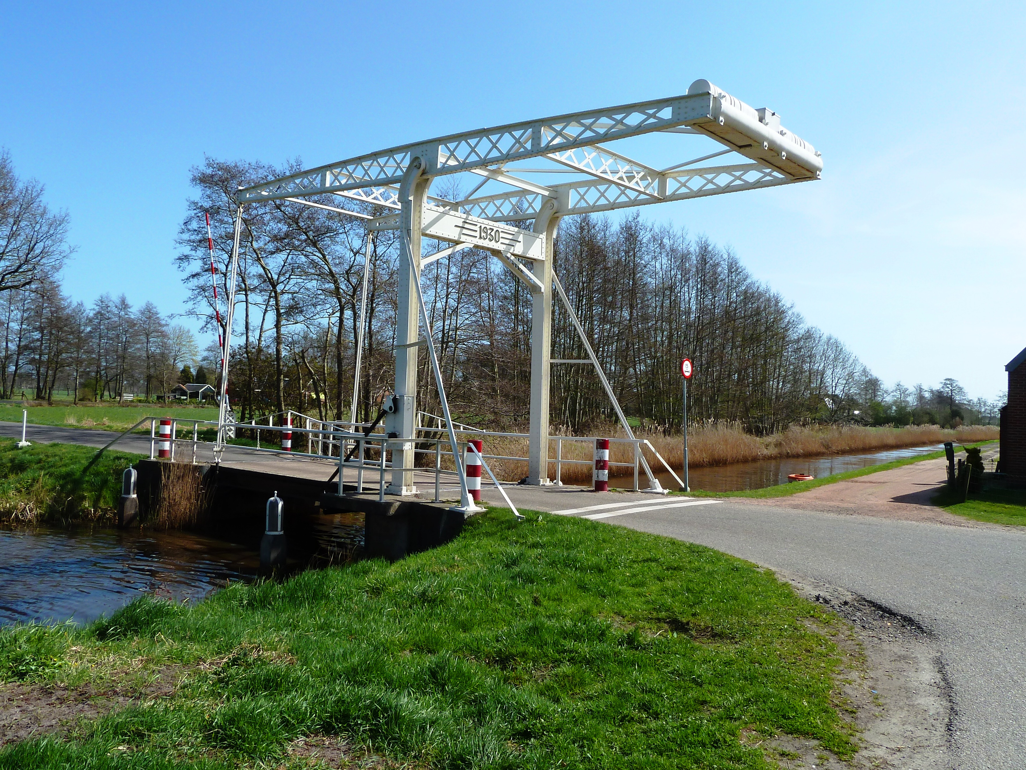 Peebos, brug over de Doezumertocht.